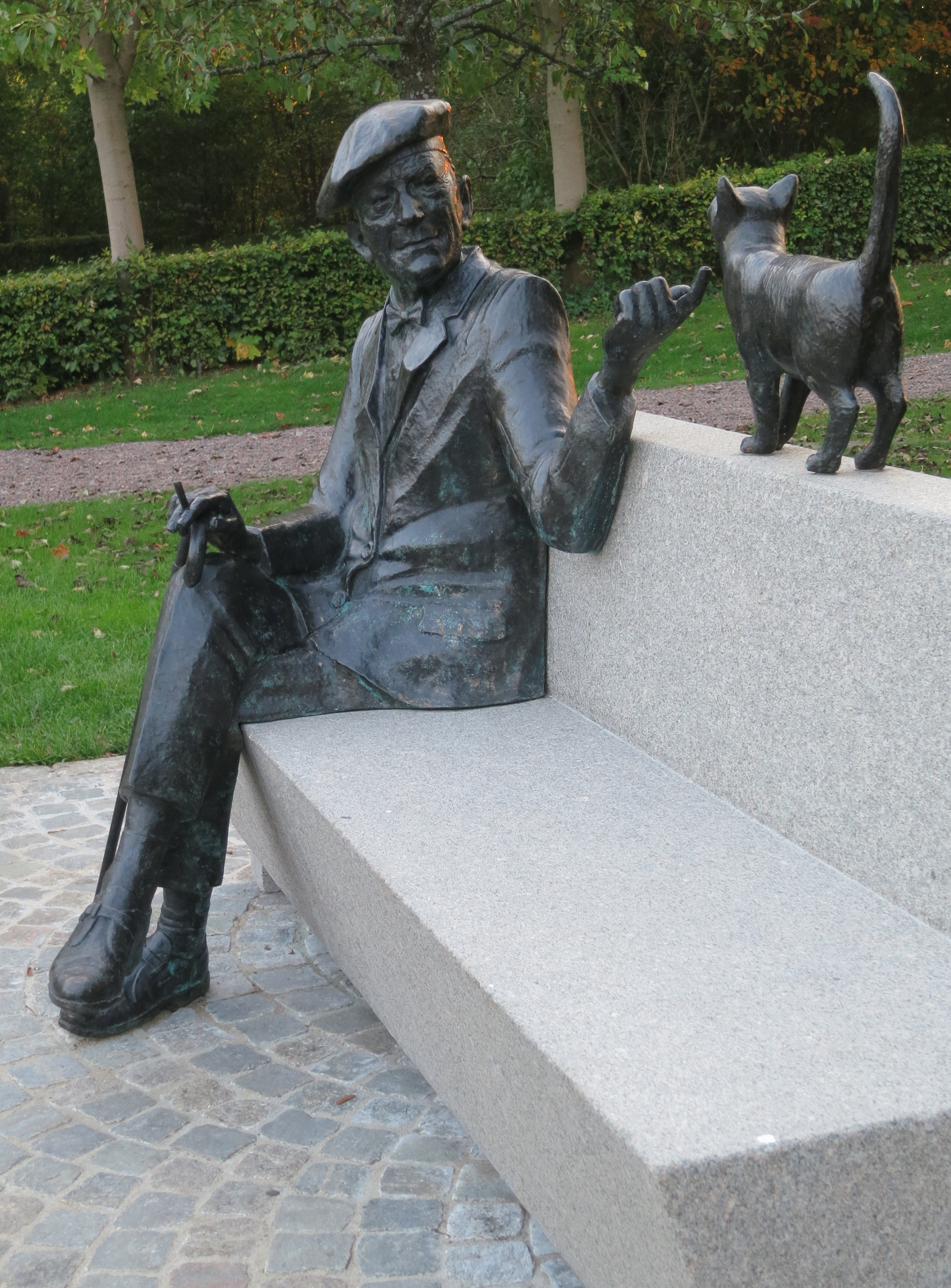 Fritjof Nilsson Piraten och katten Skorpan, skulptur av Jonas Högström i Vollsjö